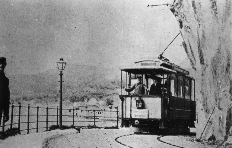 Trikken i Bergen tidlig på 1900-tallet, ved Sukkerhusbryggen